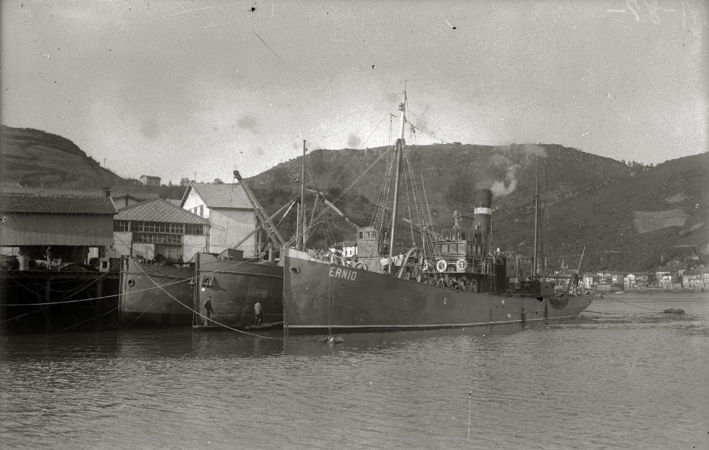 Título original: Embarcación de arrastre 'Ernio' atracada en el puerto de Pasaia (1/3) Localización: Pasajes (Guipúzcoa)